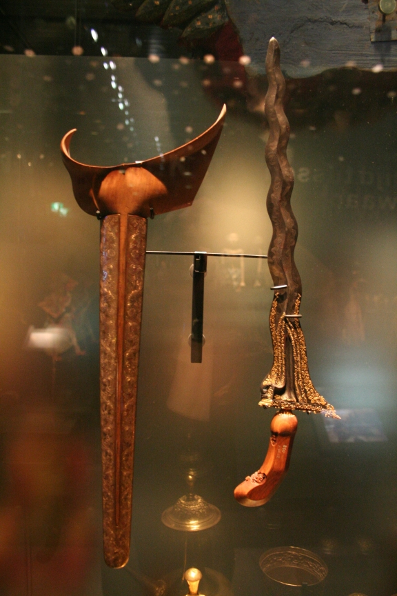 Kris (keris) and scabbard (Museum Volkenkunde, Leiden, NL)